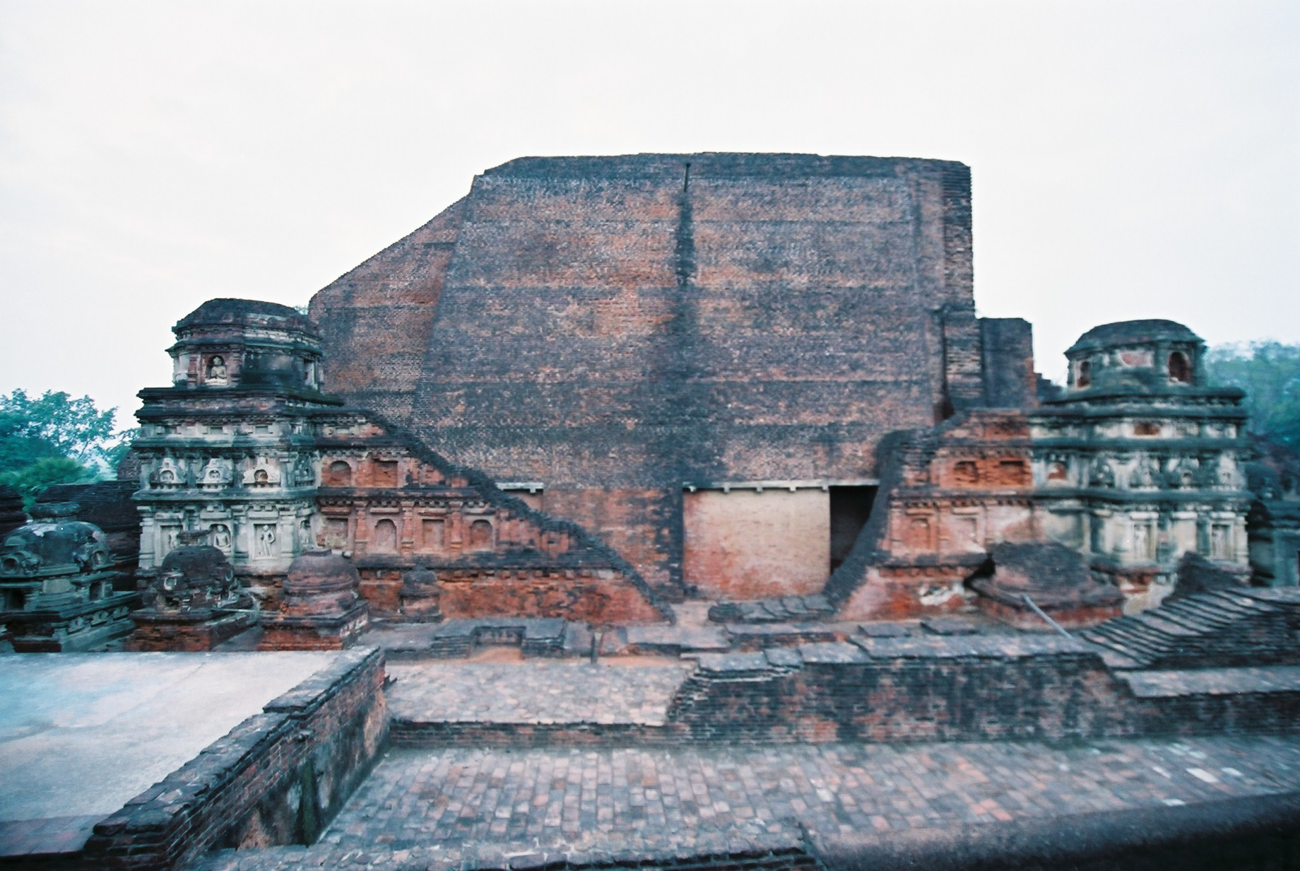 正面から見た舎利弗寺院 あいにくの曇り空で、日も暮れてきたために暗い写真になり廃墟感が増していますが、本当はもう少し明るい印象です。 (2005/01/24 Nalanda, Bihar, INDIA)